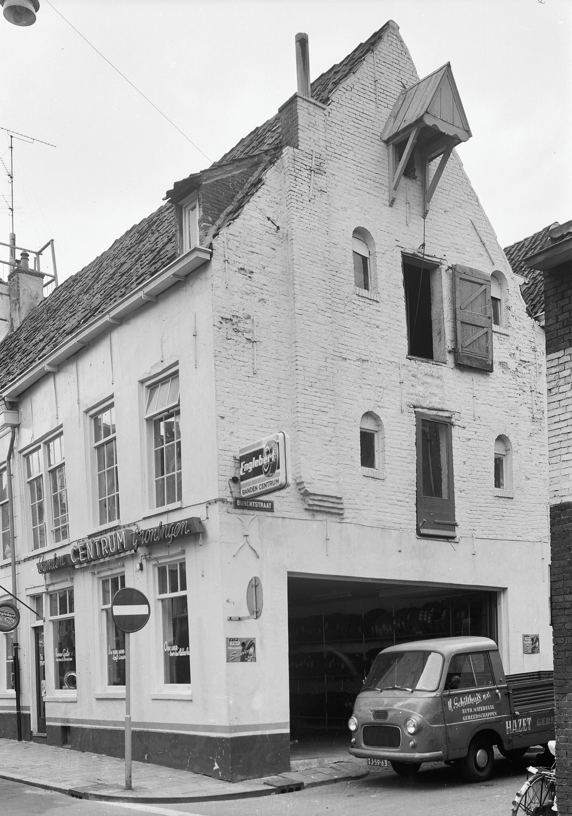 Het hoekpand Burchtstraat 2 / Kleine Gelkingestraat 2 in Groningen, voor- en zijgevel, 1966